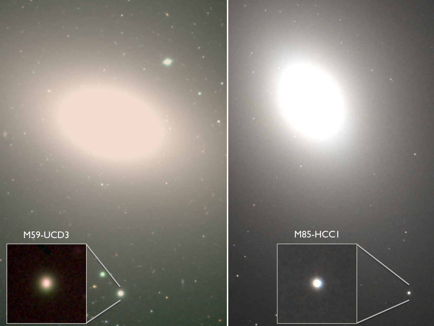 Galassie Nane Ultra-Compatte M59-UCD3 e M85-HCC1